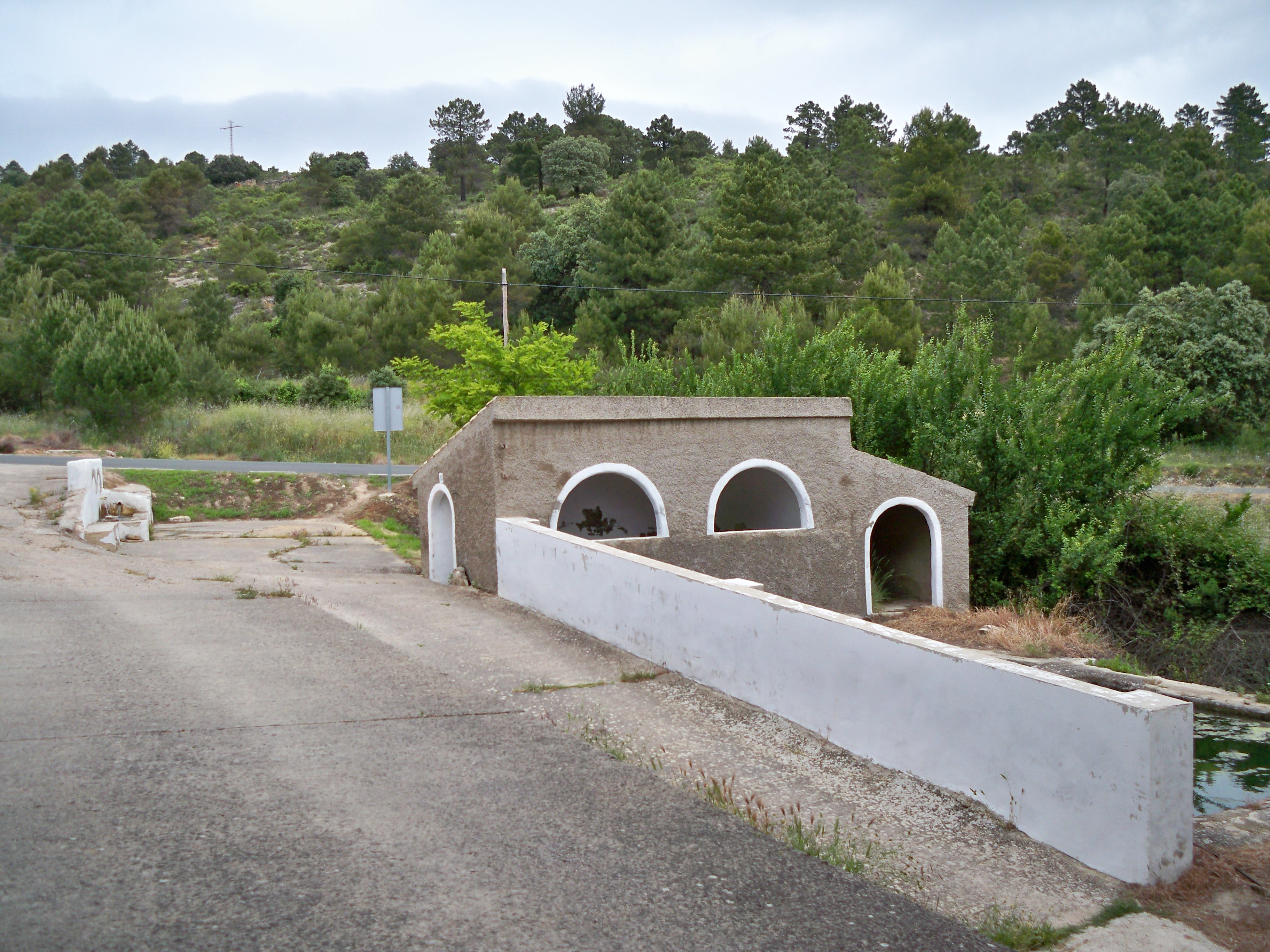 Conjunto de lavadero y fuente en la aldea de Las Hoyas (Molinicos - Albacete)